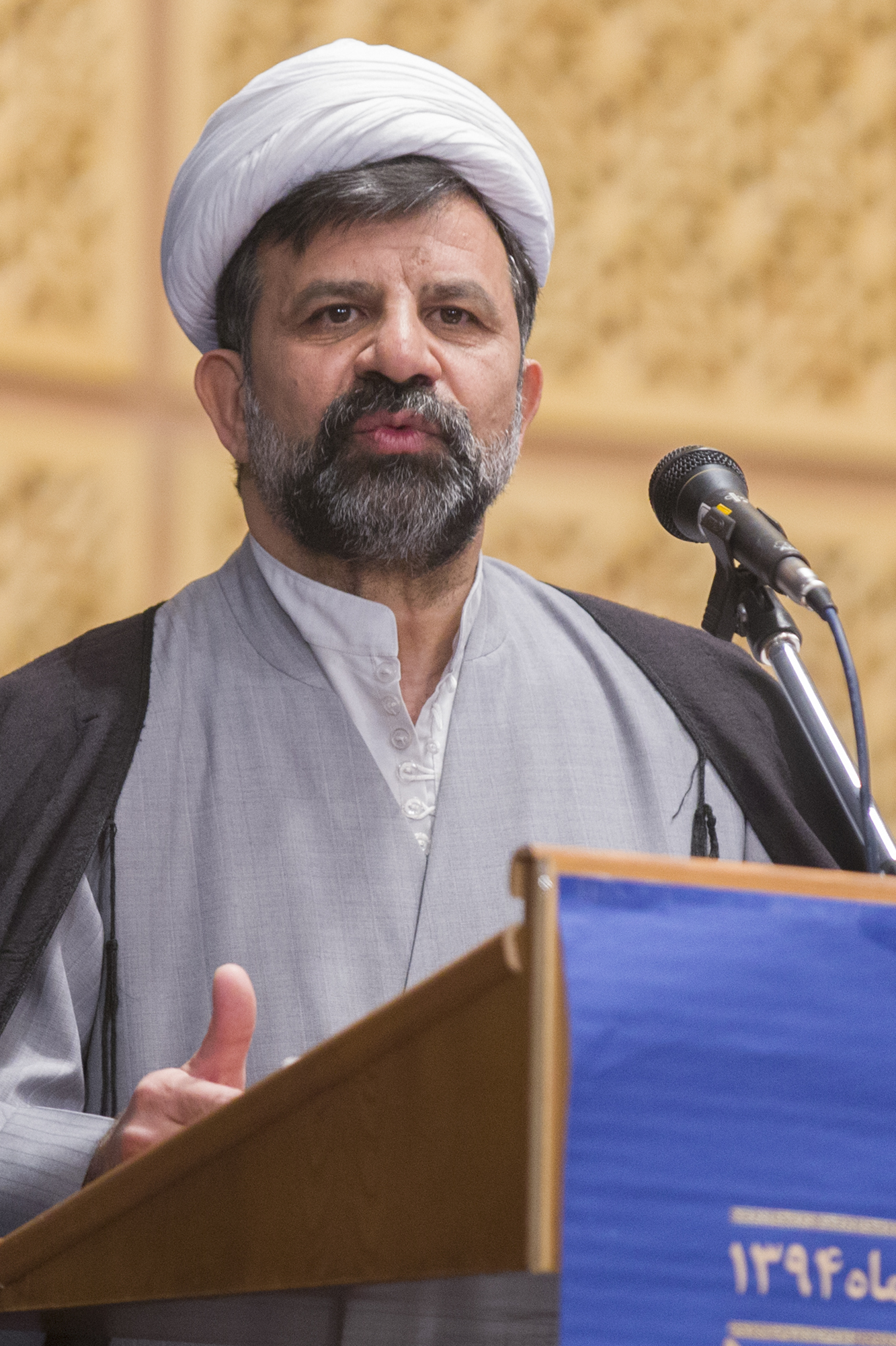 مهدی مهریزی روحانی اهل مشهد و مقیم قم است و در حال حاضر به عنوان استادیار دانشکده علوم حدیث مشغول به کار می‌باشد. دروس مقدماتی حوزه را در حوزه علمیه مشهد و دروس تخصصی فقه، اصول و فلسفه را در قم گذرانیده‌است. او پس از گذراندن ۱۱ سال درس خارج حوزه -که در مقایسه با باقی حوزه شبیه نسبت تحصیلات تکمیلی به دوره کارشناسی در مراکز آموزش عالی است - به تحصیل در دانشگاه پرداخت. در حال حاضر به عنوان استادیار دانشکده حدیث مشغول به کار می‌باشد.